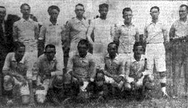 Formación del Club Atlético Belgrano de Rosario en 1931.